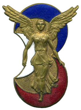 Insigne militaire de la 3° division d'infanterie Algérienne